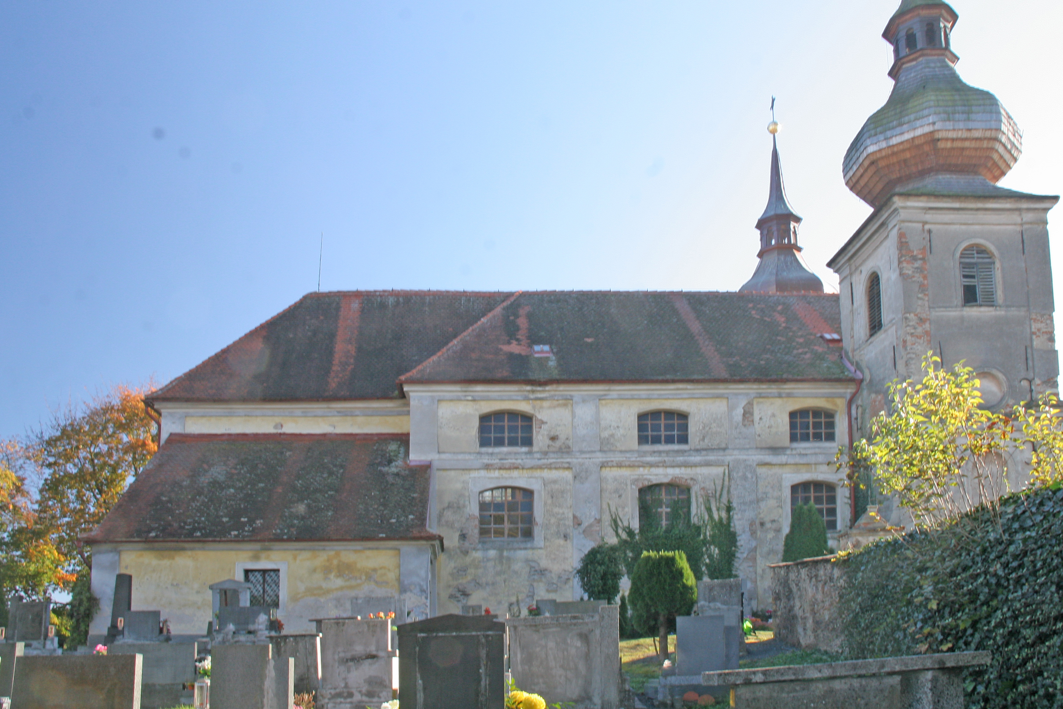 Kostel Nejsvětější Trojice, Zbyslav (Vrdy).